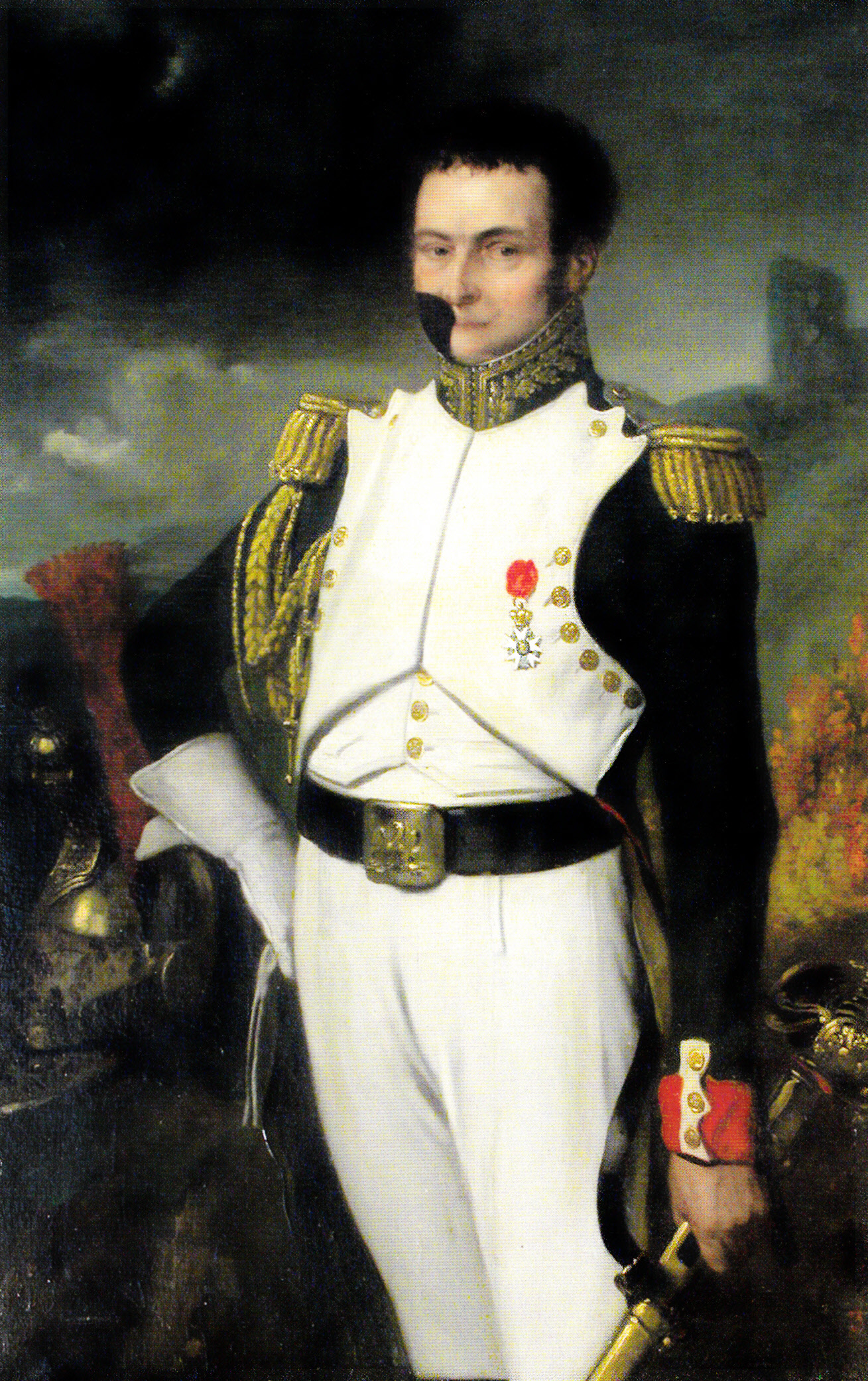 Pierre Alexis, baron de Pinteville, colonel-major des dragons de la Garde impériale. En dépit d'une très grave blessure reçue à Toeplitz, le 17 septembre 1813, il reste au régiment jusqu'en septembre 1814 et finira sa carrière comme maréchal de camp. Prévost & Bourgeot, p. 35 : « la première chose qui "saute" aux yeux se situe au niveau de la prothèse portée par Pinteville, conçue en argent et doublée de cuir, elle permettra à cet homme de continuer à vivre décemment malgré l'horrible blessure qui lui fut infligée en 1813 ! »